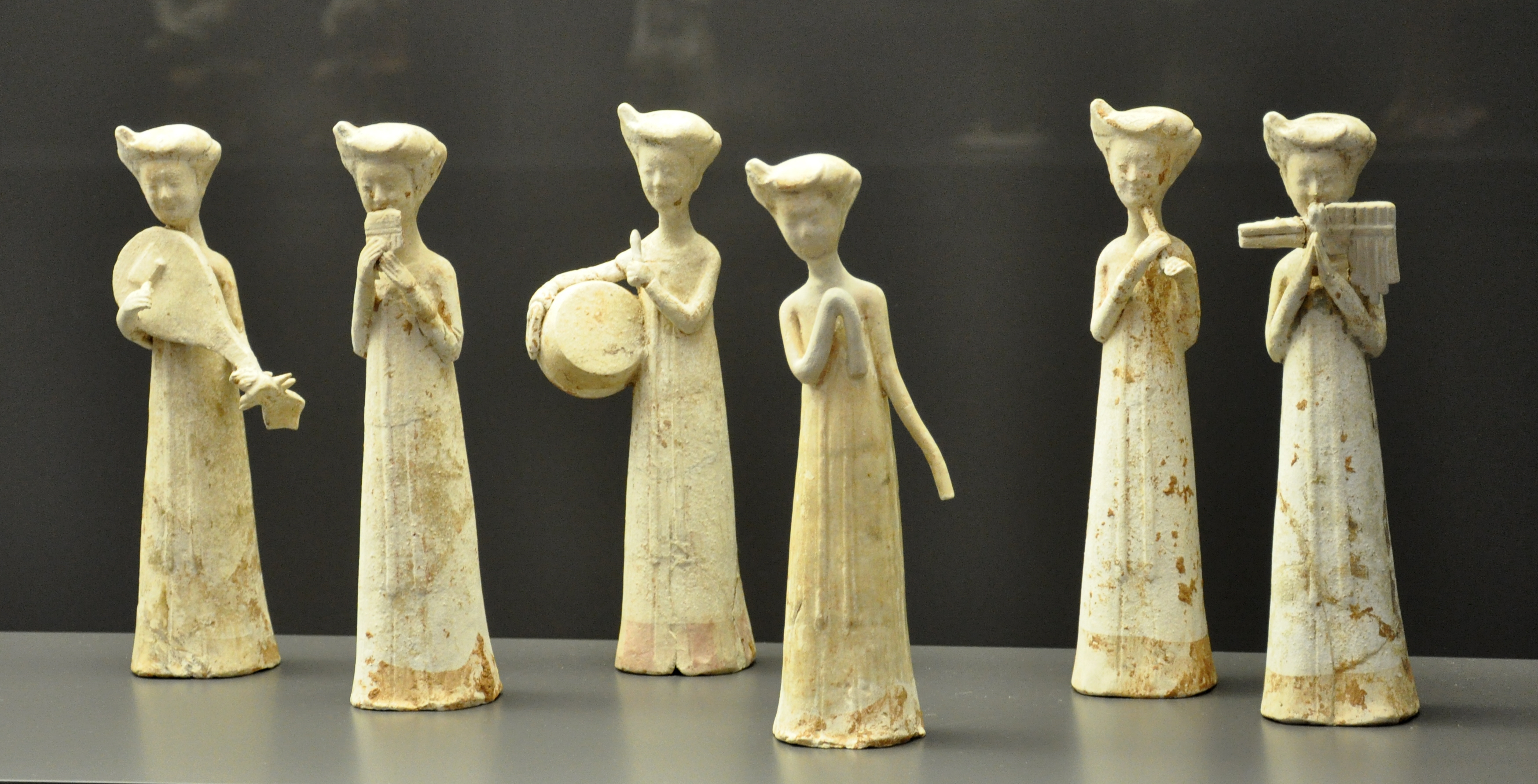 Musikantinnen mit Tänzerin, China, Sui-Dynastie, glasierter Ton Museum Rietberg, Zürich; Inv. Nr. RCH 507